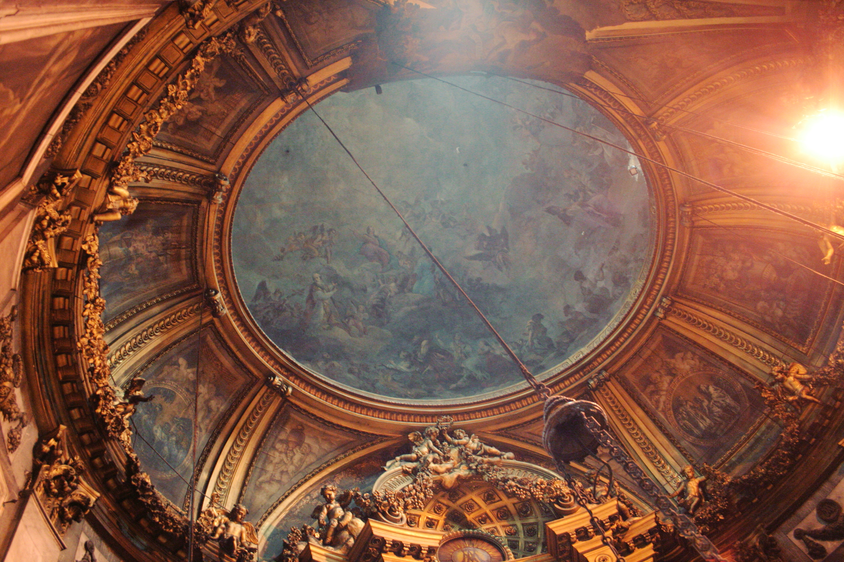 Coupoles de la Chapelle de la Vierge de l'église Saint-Sulpice à Paris